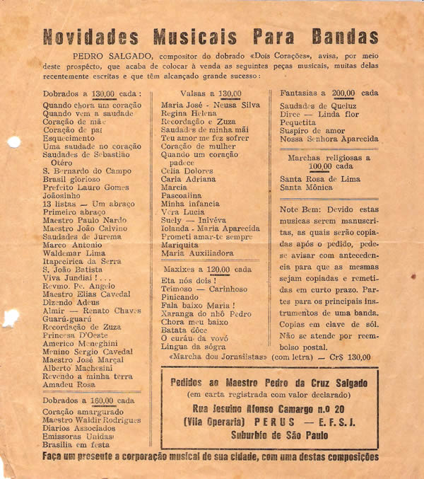 Página de Jornal da década de 1920 anuncia peças musicais do compositor brasileiro Pedro Salgado colocadas à venda